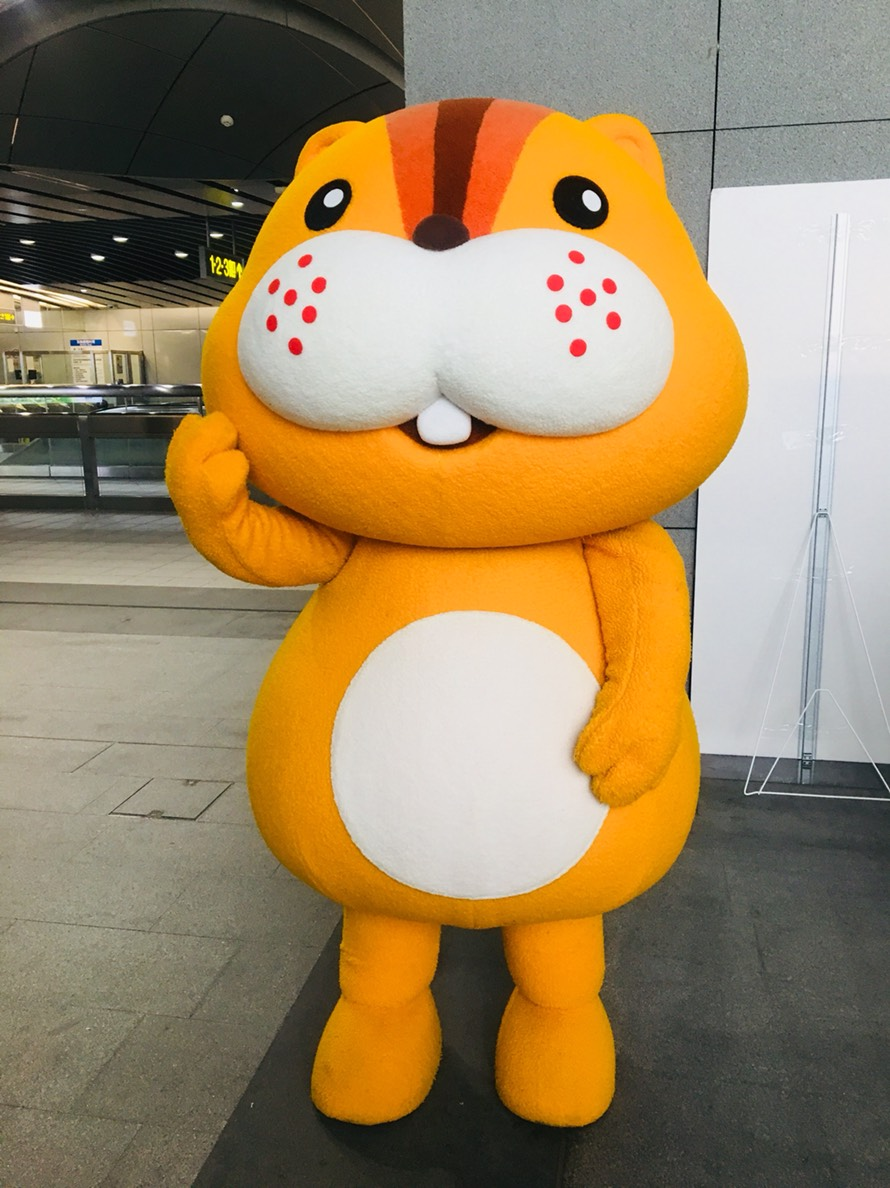 UU醬